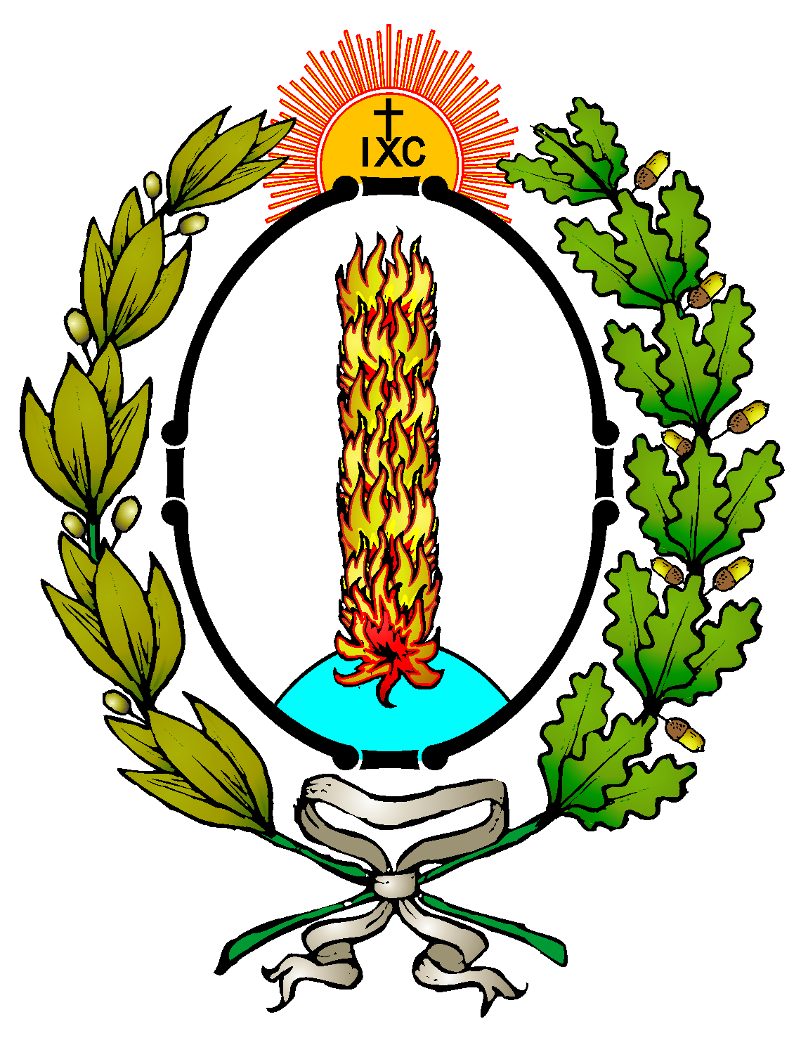 Herb Zakonu Bazylianów Świętego Jozafata